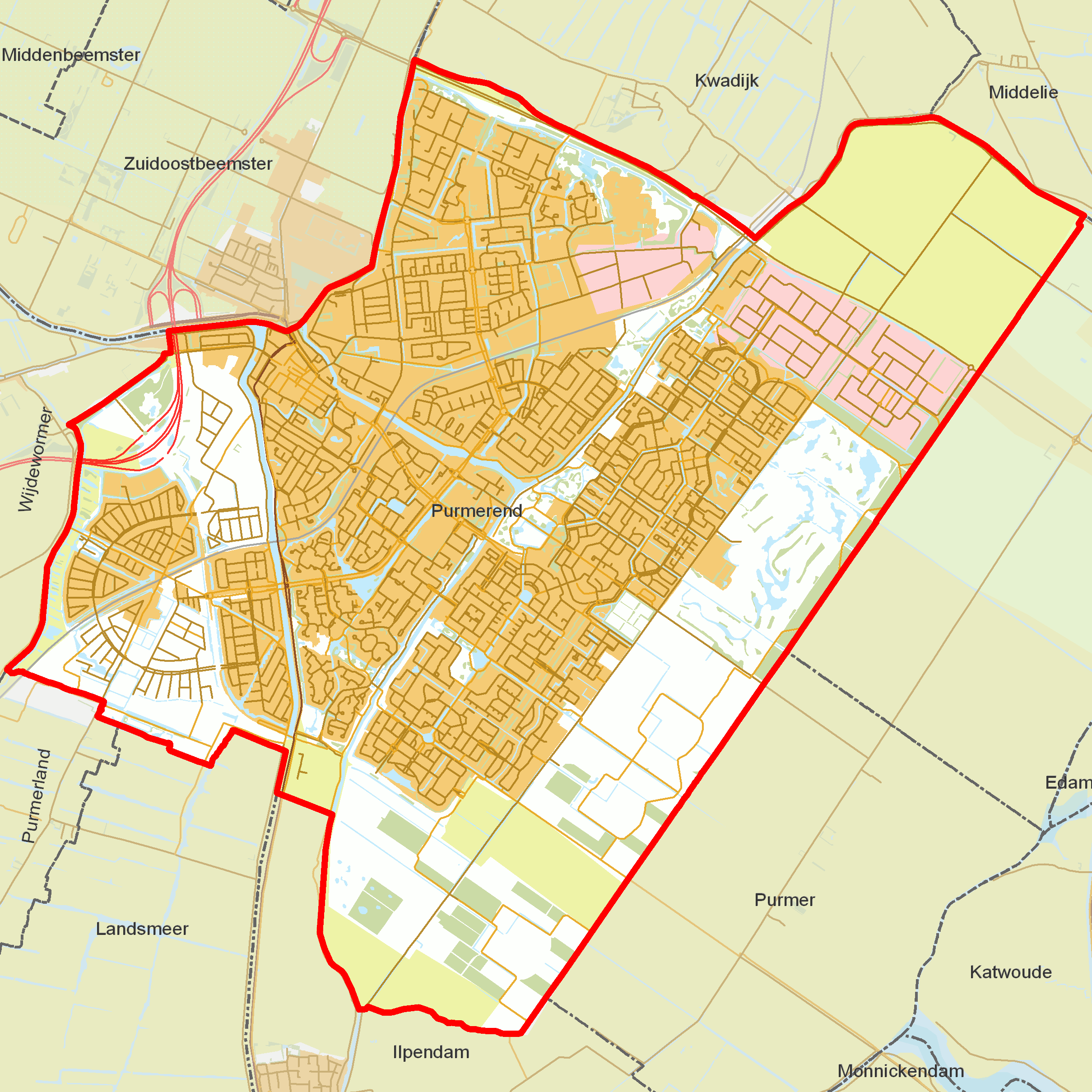 BAG woonplaatsen - Gemeente Purmerend.png